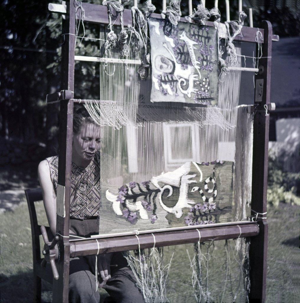 Gunn Leander Bjurström väver 'Skapelsen' efter en kartong av Berta Hansson